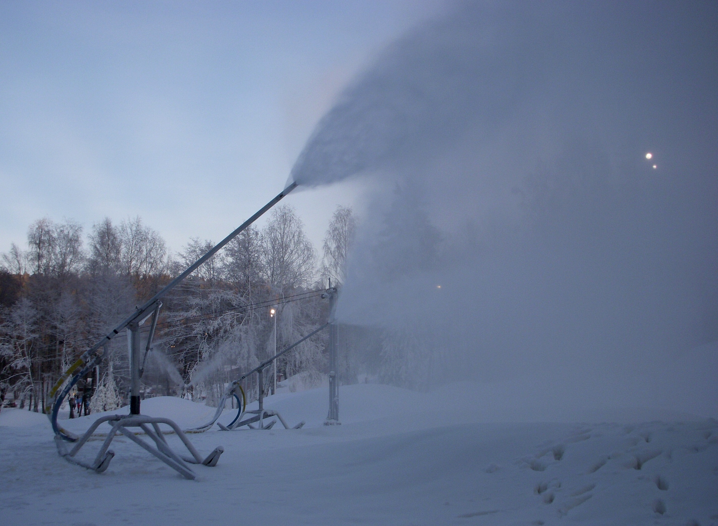 Snökanon av typ snölans på Flottsbrobacken i Stockholm